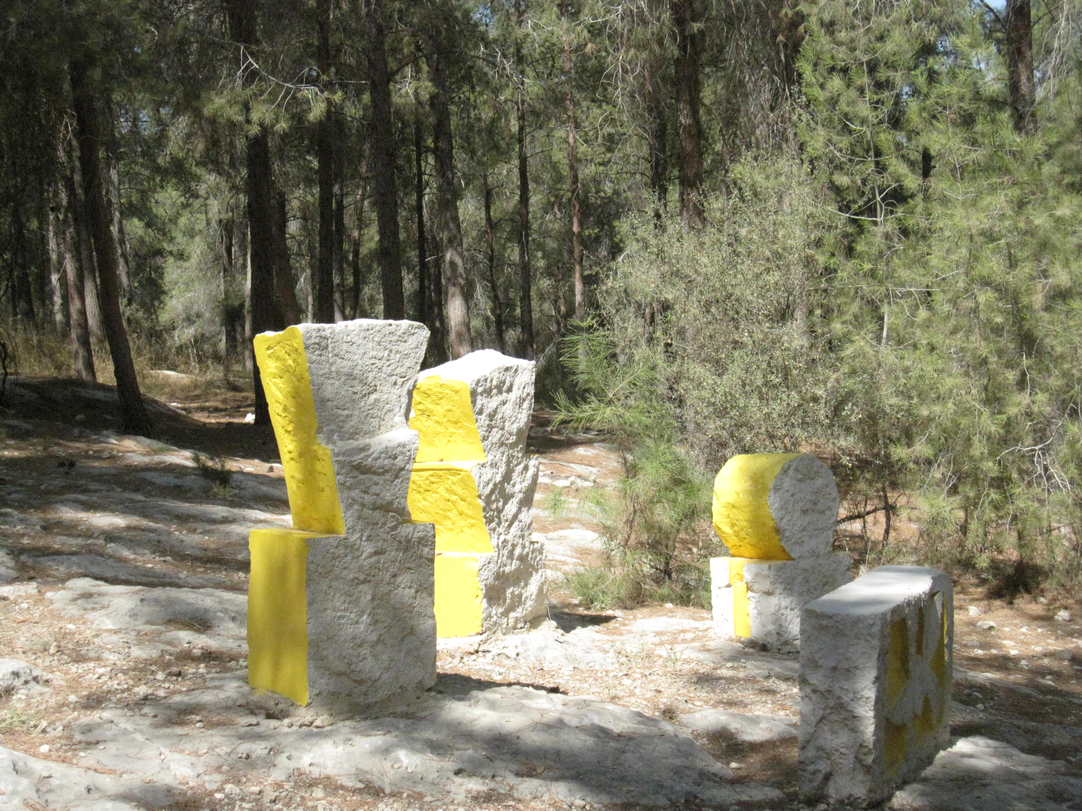 אחד מהפסלים ביער צרעה